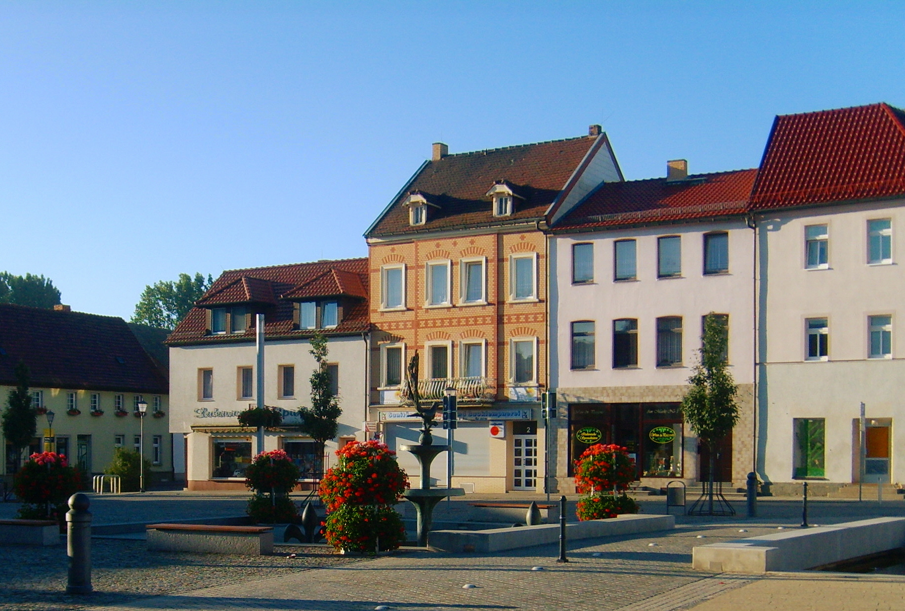 Der Elsterbrunnen auf dem Elsterwerdaer Markt im Juni 2011.